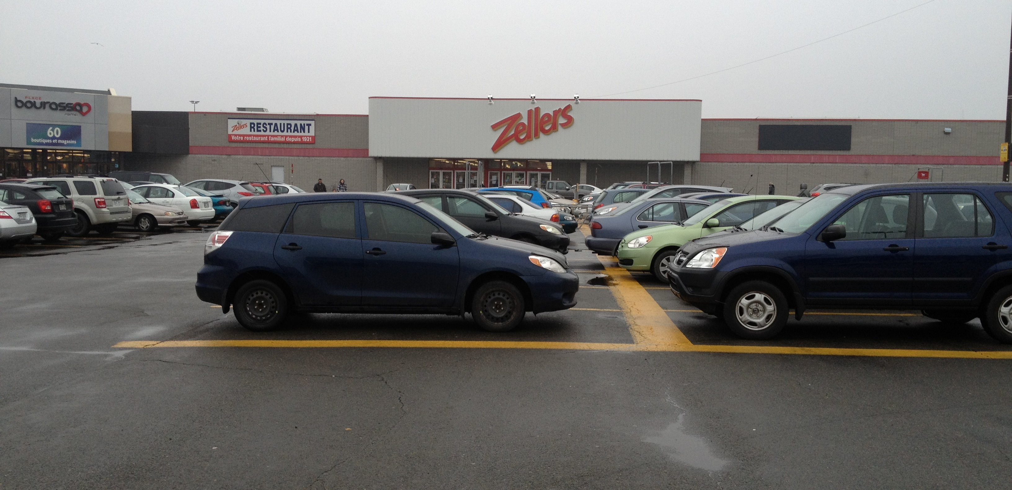 Zellers Boulevard Lacordaire Montreal-Nord, QC 1